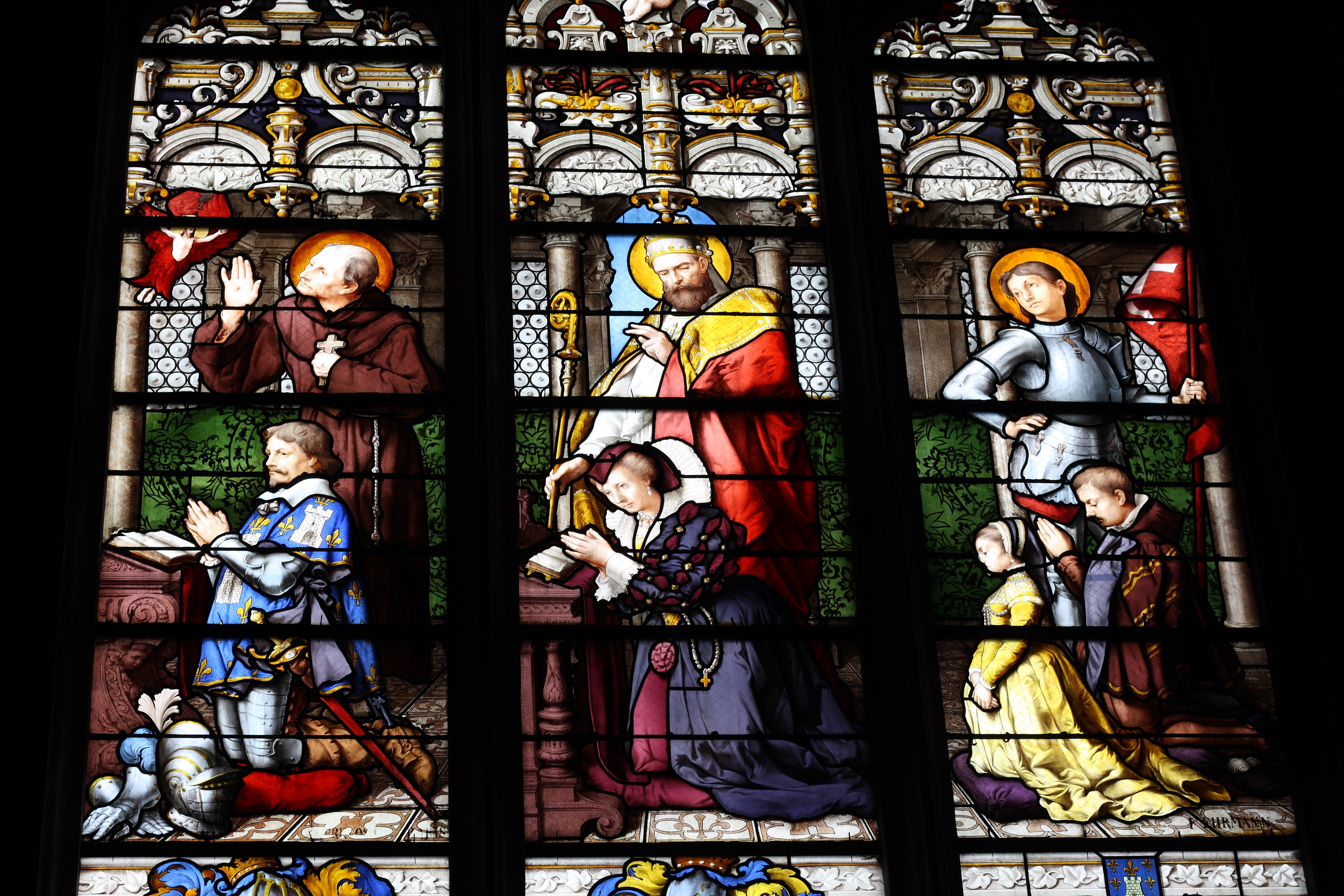 Ausschnitt des Bleiglasfensters Nr. 16 (19. Jahrhundert) in der katholischen Pfarrkirche Saint-Martin (Collégiale Saint-Martin) in Montmorency, Darstellung: François de la Tour d'Auvergne (links), seine Frau Éléonore de Montmorency (Mitte) und zwei Kinder, Karton: Charles Leprévost, Ausführung: François Emile Ehrmann (siehe: Dominique Foussard, Charles Huet, Mathieu Lours: Églises du Val-d'Oise. Pays de France, Vallée de Montmorency, Société d'Histoire et d'Archéologie de Gonesse et du Pays de France, 2. Auflage, Gonesse 2011, ISBN 9782953155426)